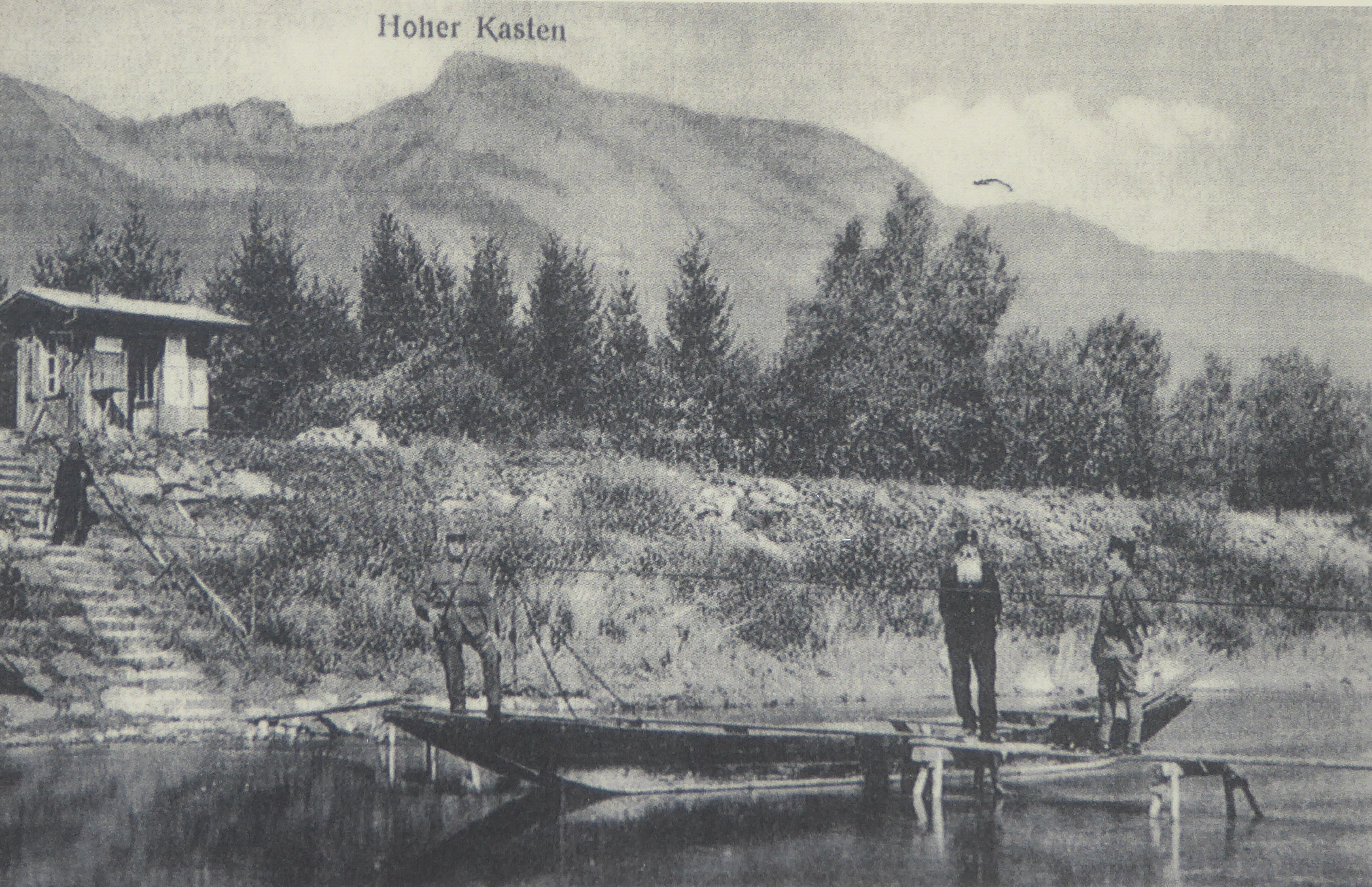 Schutzhütte für Grenzwächter am Rhein bei Ruggell FL, im Hintergrund der Hohe Kasten im AlpsteingebirgeWeitere Informationen